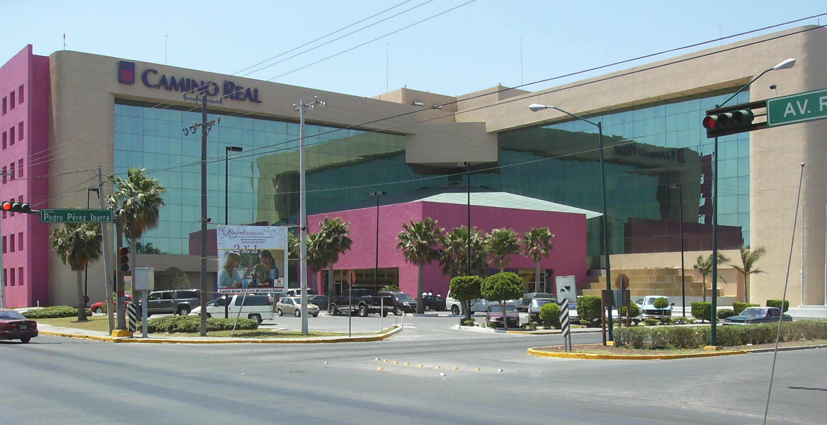 Camino Real in Nuevo Laredo